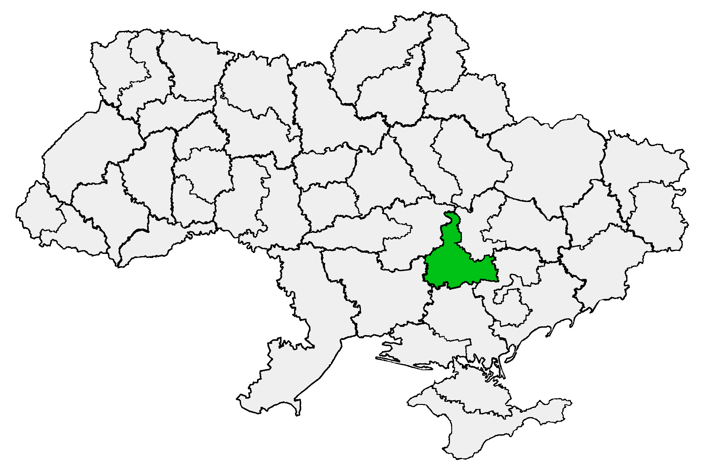 Криворізька єпархія УПЦ(МП)